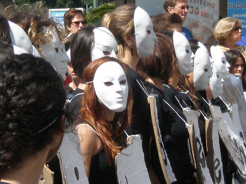 Demonstration "No pagaremos la crisis", Málaga 2009